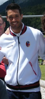 Nicolò Cherubin with Bologna FC.